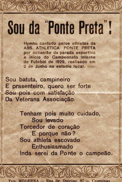 Hino da Ponte Preta no ano de 1929.